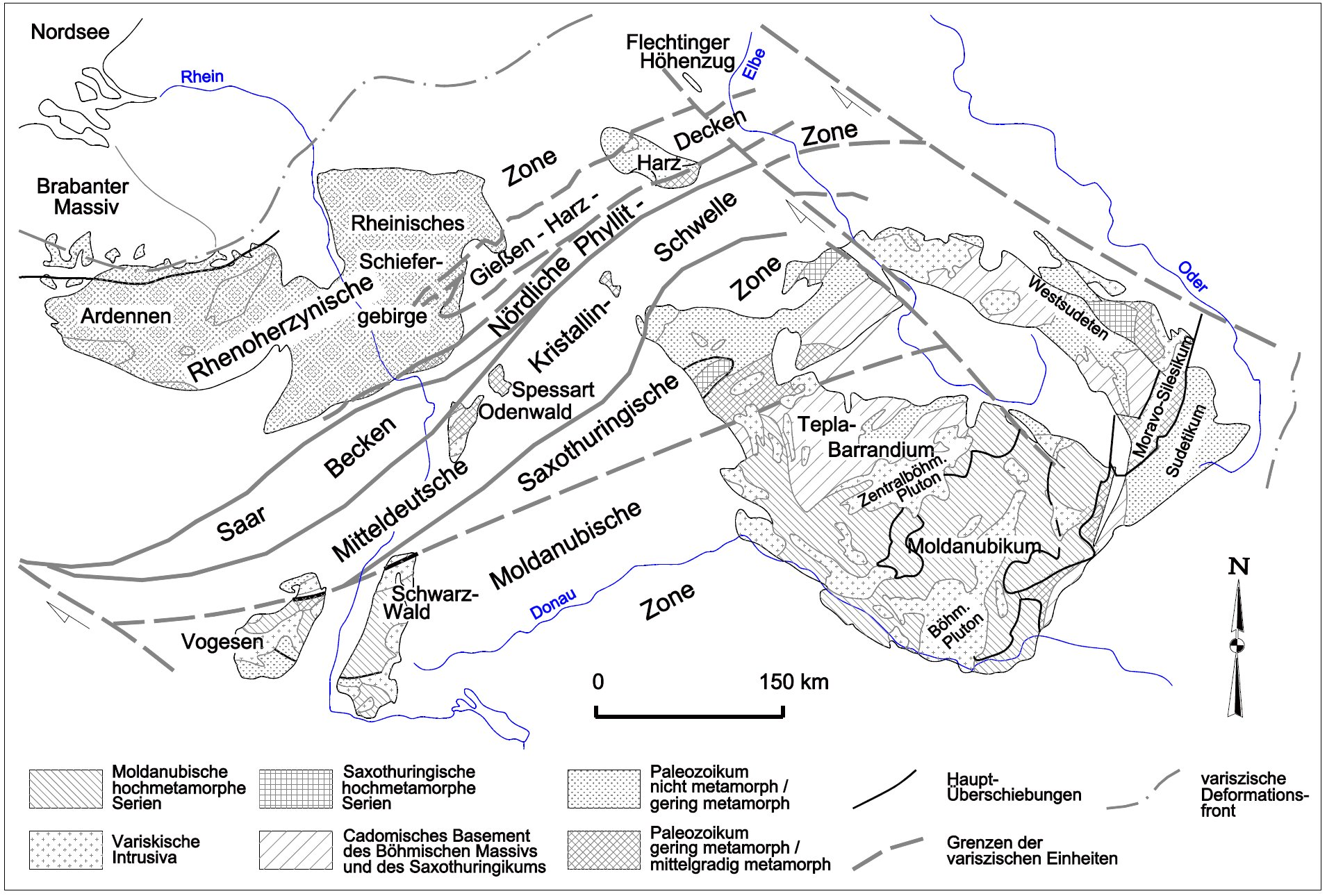 Gliederung der Varisziden in Mitteleuropa nach Kossmat 1927, verändert nach Franke & Hoffmann 1997, Oncken 1997, 1998